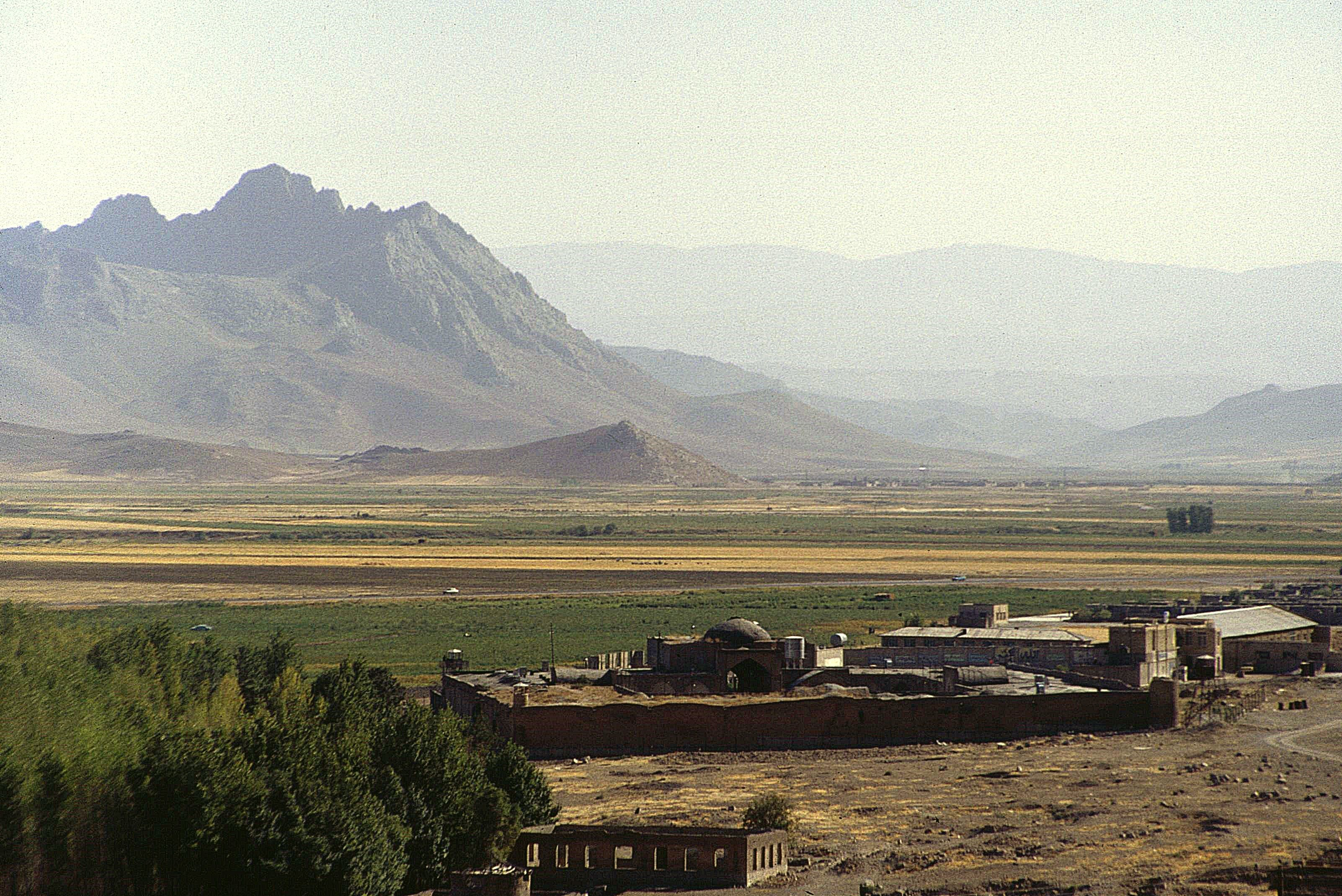 Bisotun, Landschaft